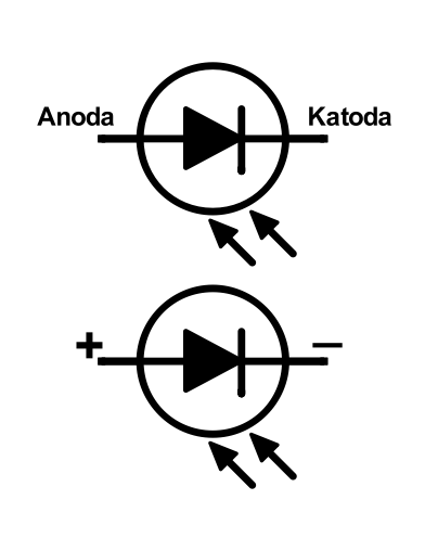 Simbol za fotodiodo z označeno anodo in katodo (zgoraj) oziroma z označeno pozitivno napetostjo (spodaj).